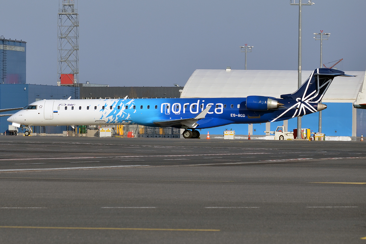 Nordica, ES-ACD, Canadair CRJ-900ER